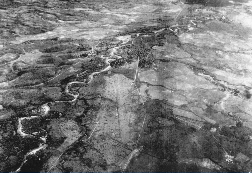 Toàn cảnh cánh đồng Điện Biên